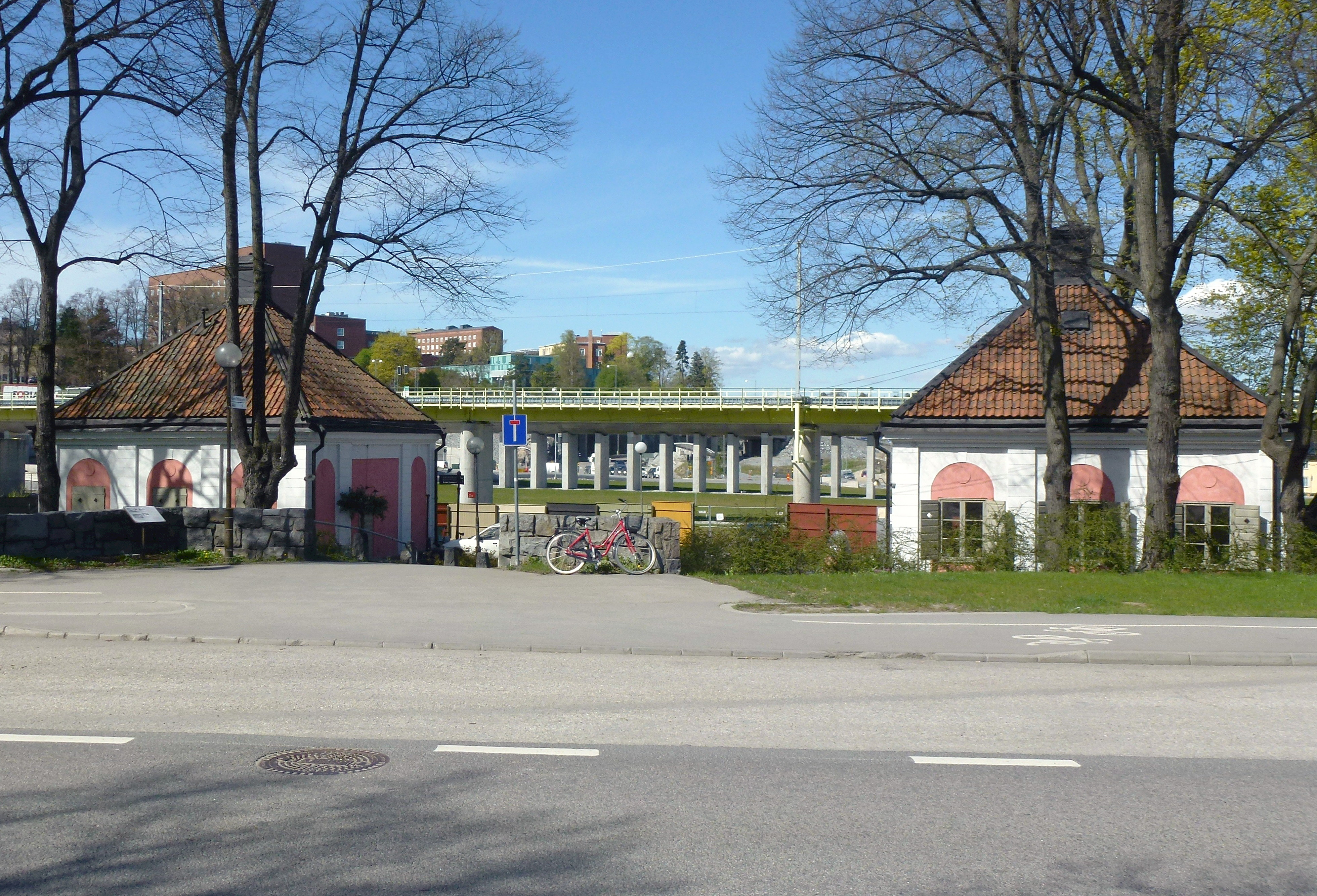 Norrtulls tullstugor